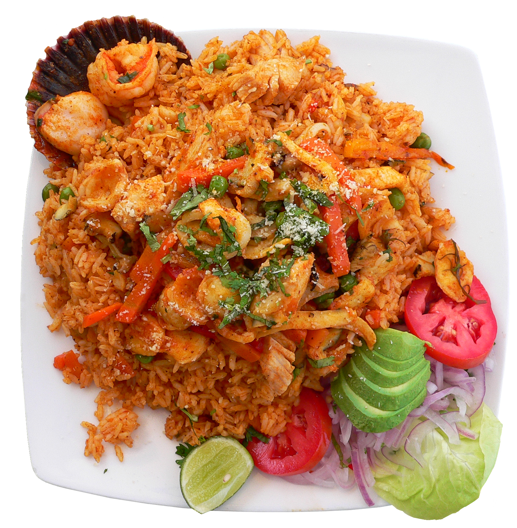 Arroz con mariscos. Plato de la gastronomía del Perú. Foto tomada por Manuel González Olaechea y Franco ©